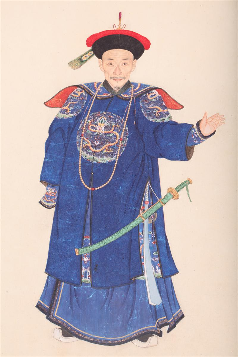 《御筆平定臺灣二十功臣像贊》中的海蘭察畫像，2014年由紐約iGavel拍賣行拍賣。畫像右側為清朝乾隆皇帝御筆的題贊：「領隊侍衛內大臣超勇公海蘭察 勇弗知書謀勝智士匹馬彎弓賊不敢視欲致活口射勿令死進爵錫服言難盡美」。